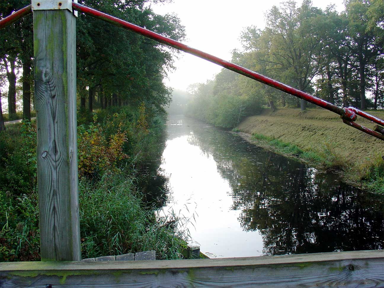 Oranjekanaal ter hoogte van de Heirweg in Westenesch